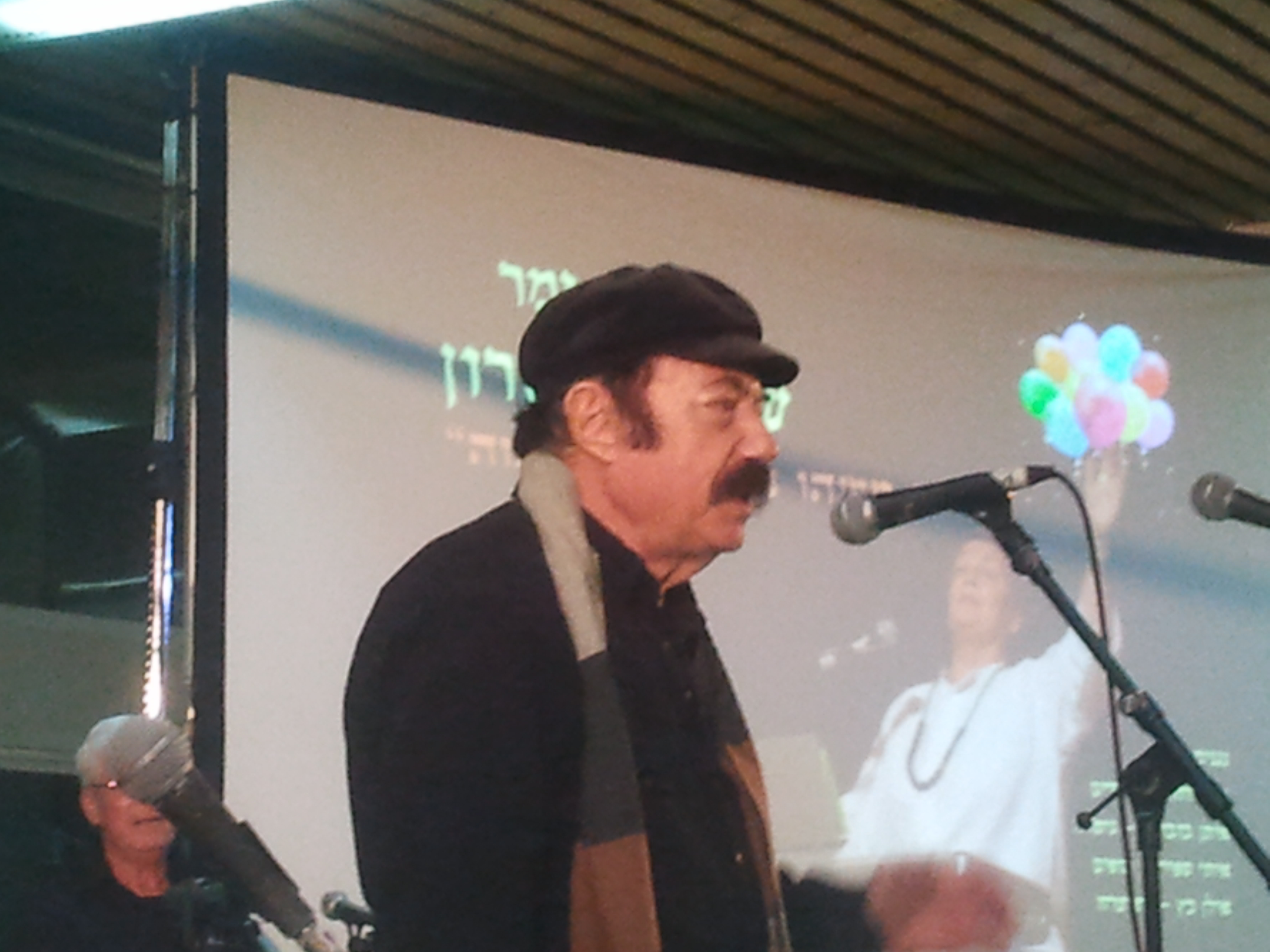 יוסי גמזו הוא משורר, מתרגם ופזמונאי ישראלי, פרופסור לספרות עברית. צולם במועדון הזמר עמק הירדן בתוכנית שהוקדשה לשיריו